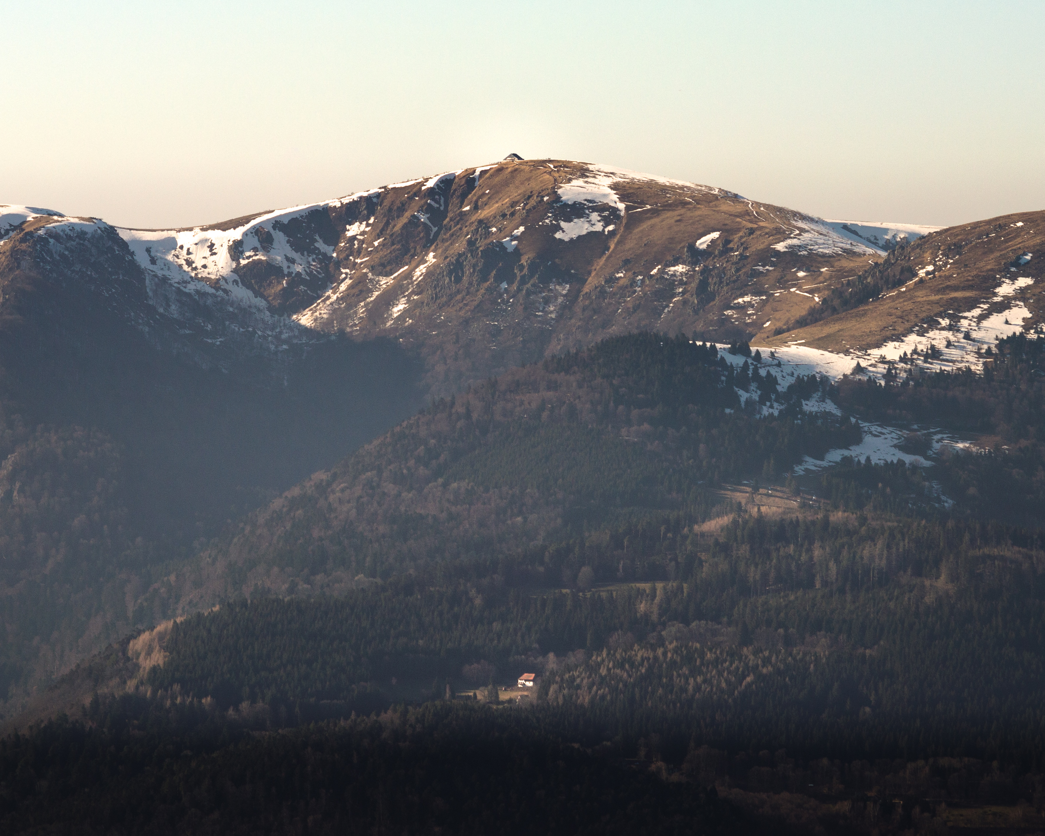 Le Hohneck. Prise le 9 mars 2014.